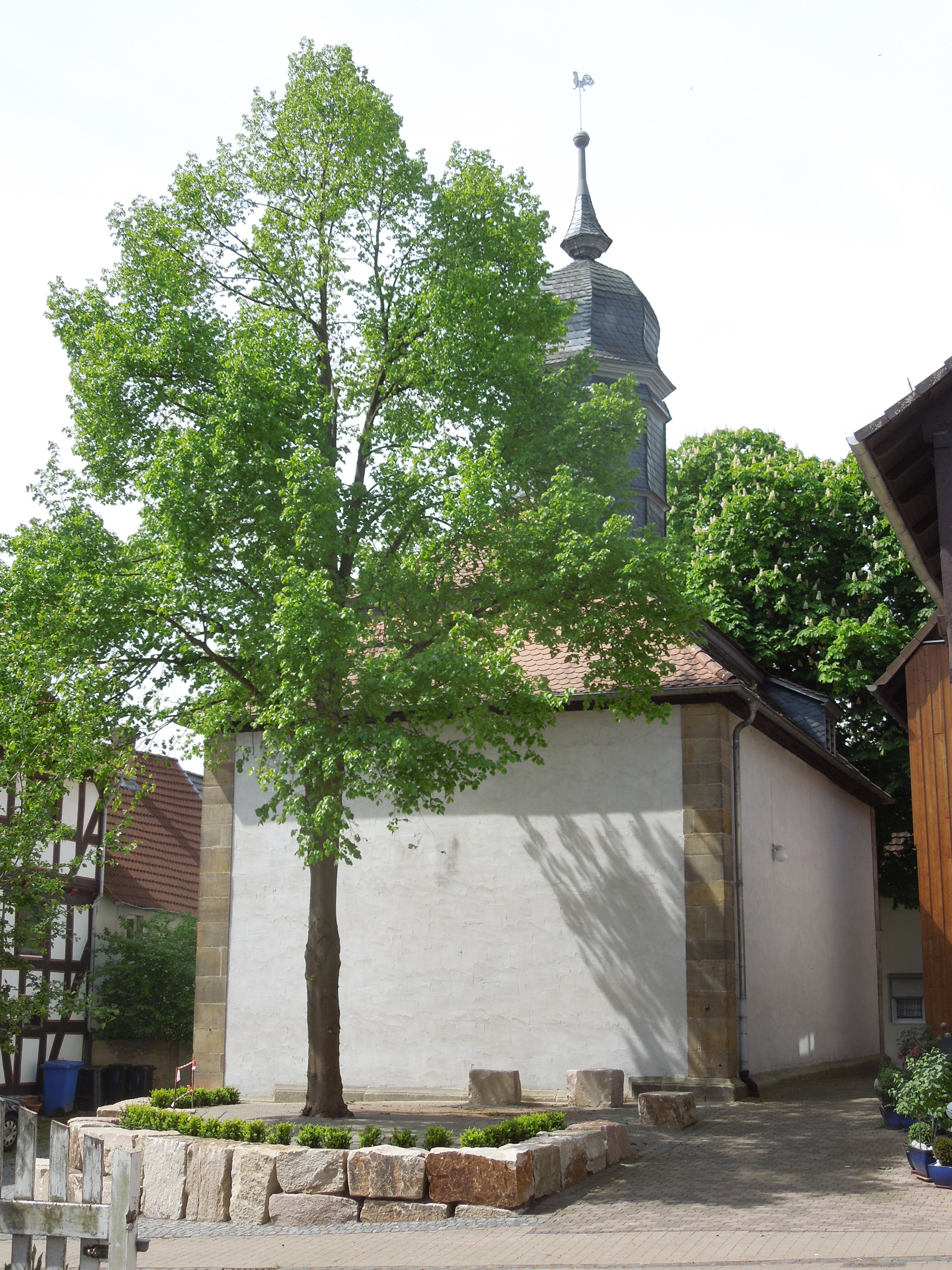 Die evangelische Dorfkirche im Gudensberger Stadtteil Dorla